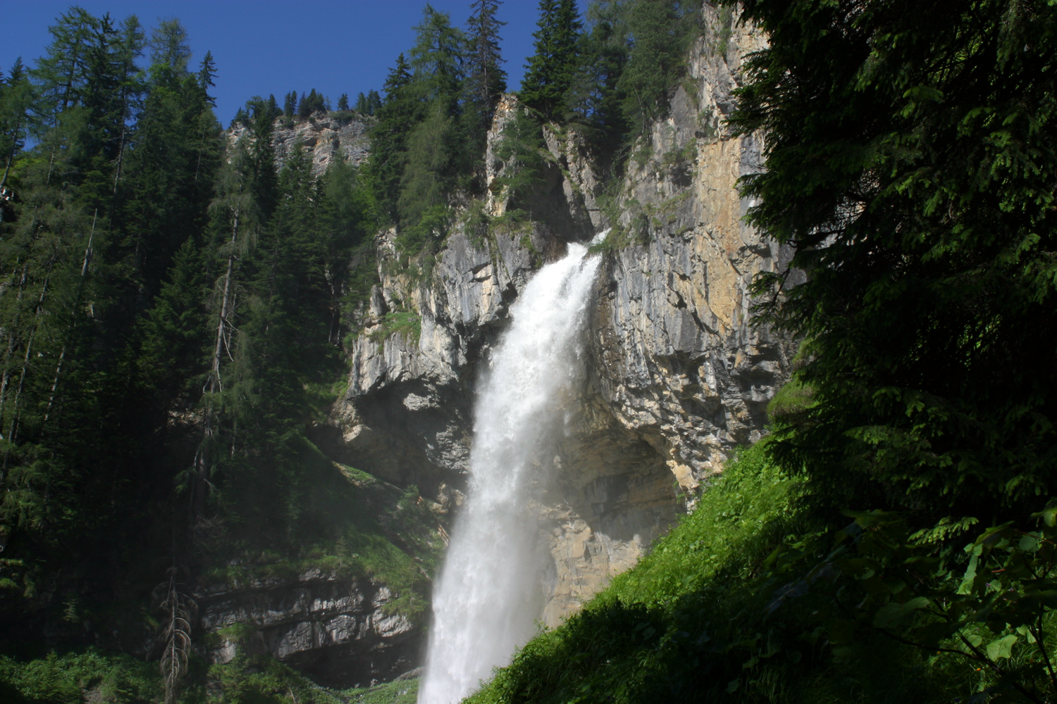 Johanneswasserfall bei der Gnadenalm This media shows the natural monument in Salzburg with the ID NDM00008.